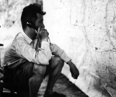 1948年，粟裕在睢杞、豫东战役指挥所指挥战斗